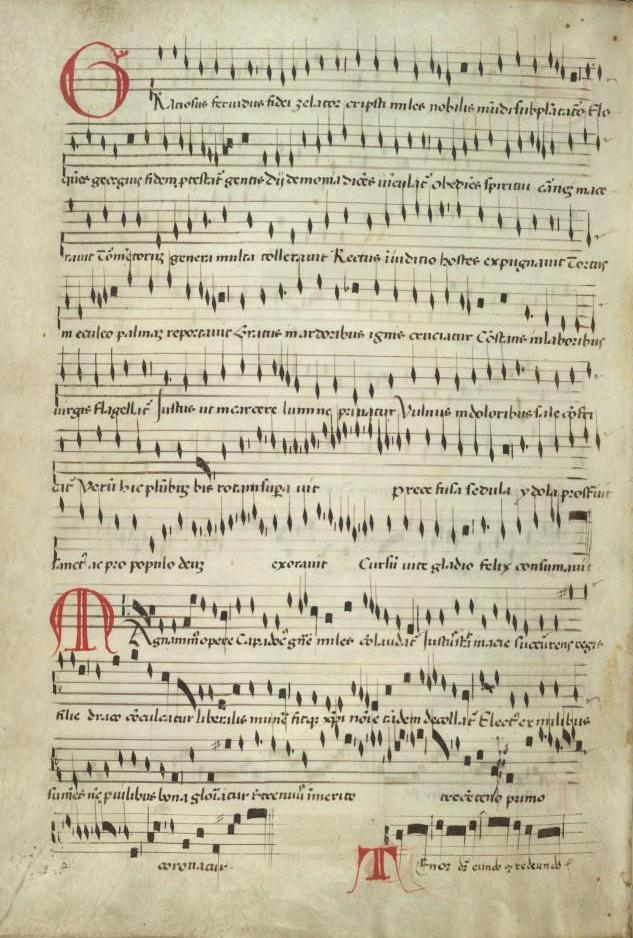 Gratiosus Fervidus (Modena BE α. 5,25)